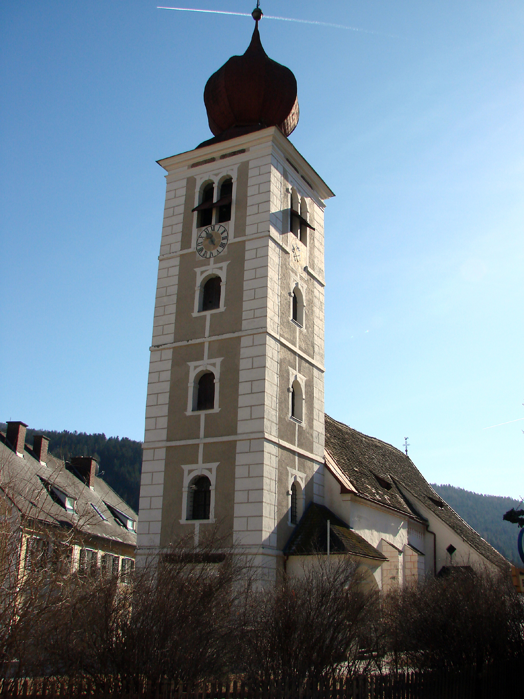 Kirche in Koglhof